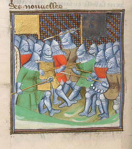 Battle scene, at the beginning of 'Comment le captal de beuth fut pris a la bataille de subize...', in Jean Froissart's Chroniques d'Angleterre.